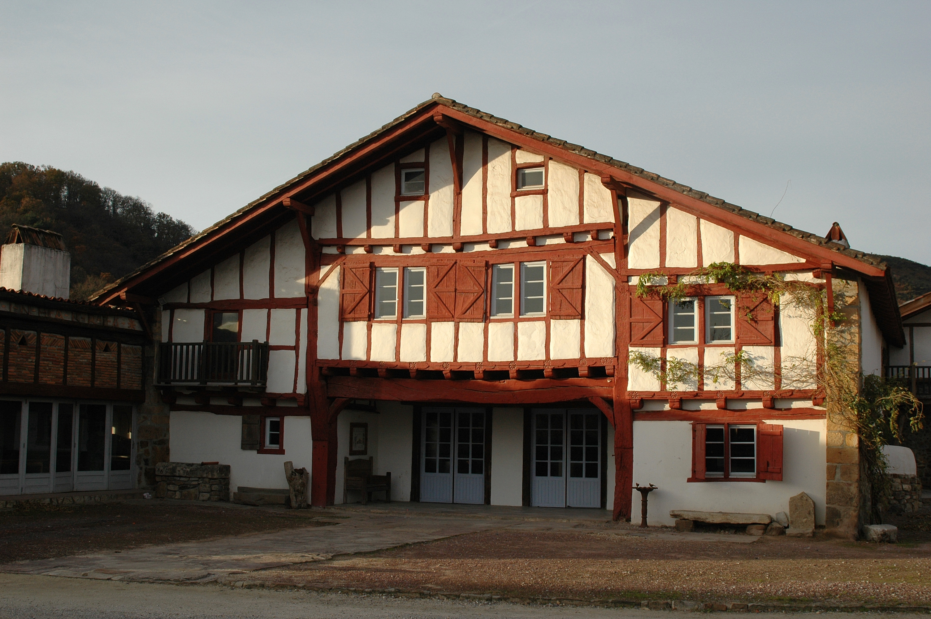 Saint-Pée-sur-Nivelle, quartier Ibarron, vieille ferme labourdine. Photo prise le 31/12/06 par Harrieta171